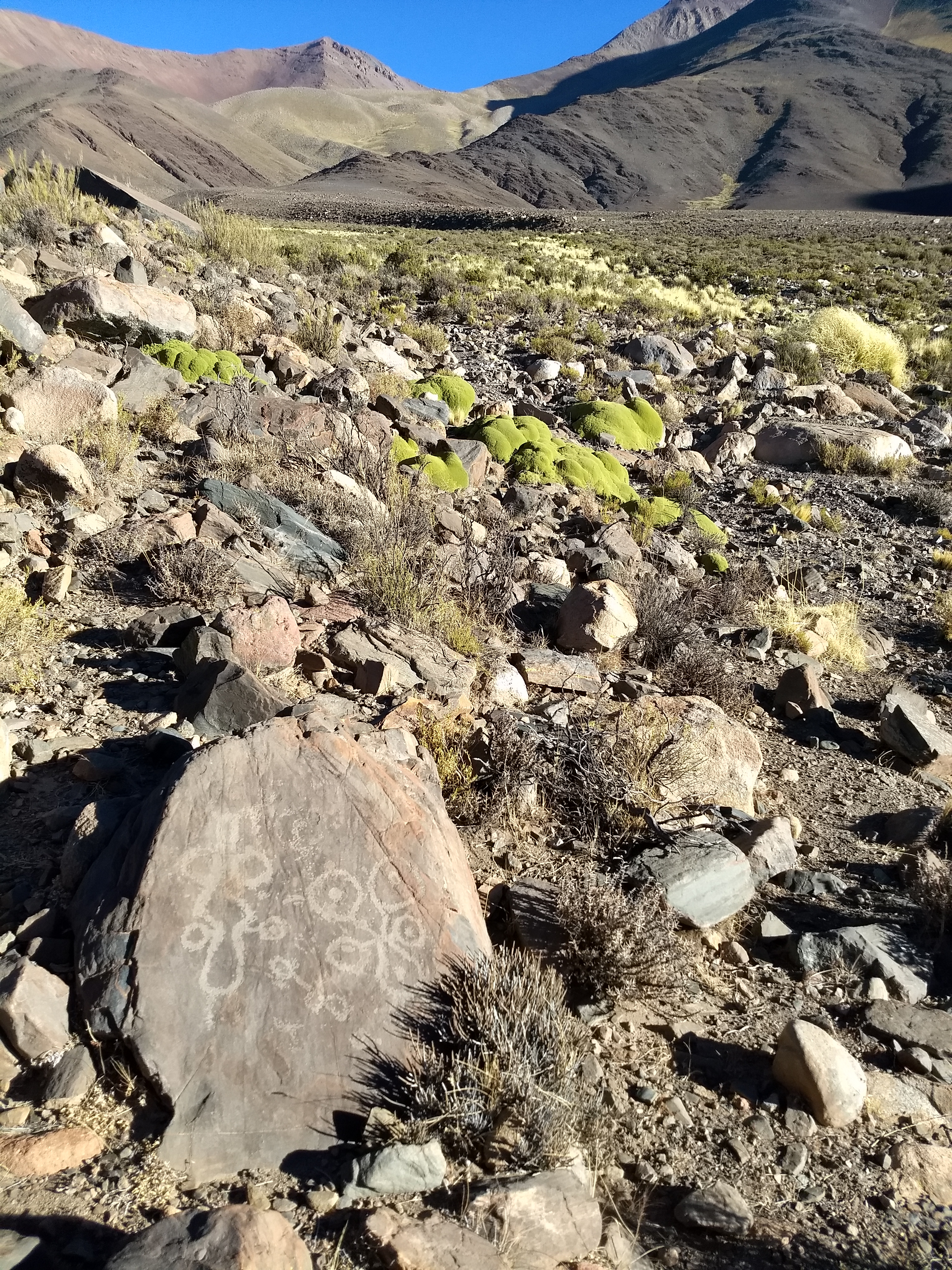 cultural. Monumento